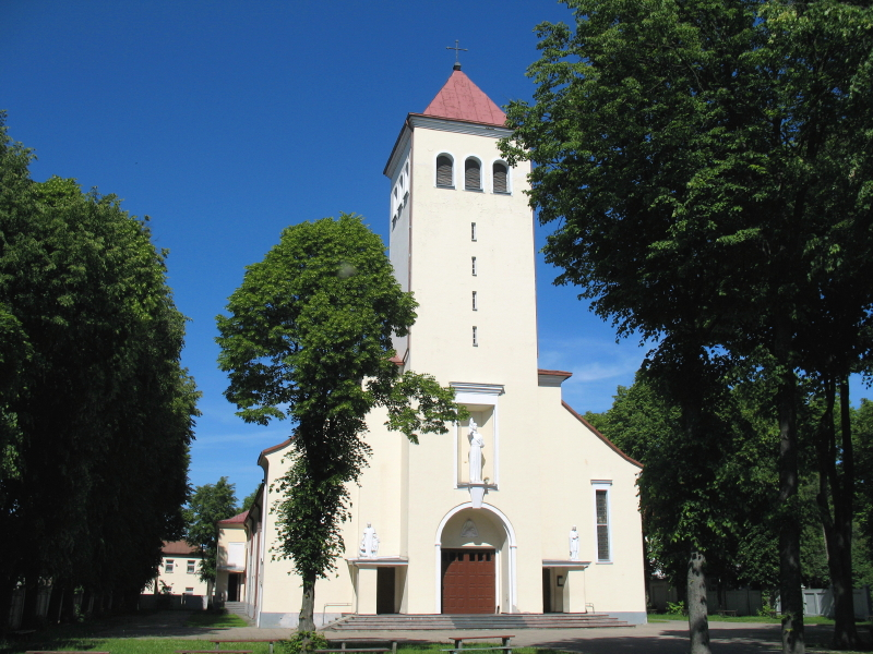 Šv. Antano Paduviečio bažnyčia, Kaunas.